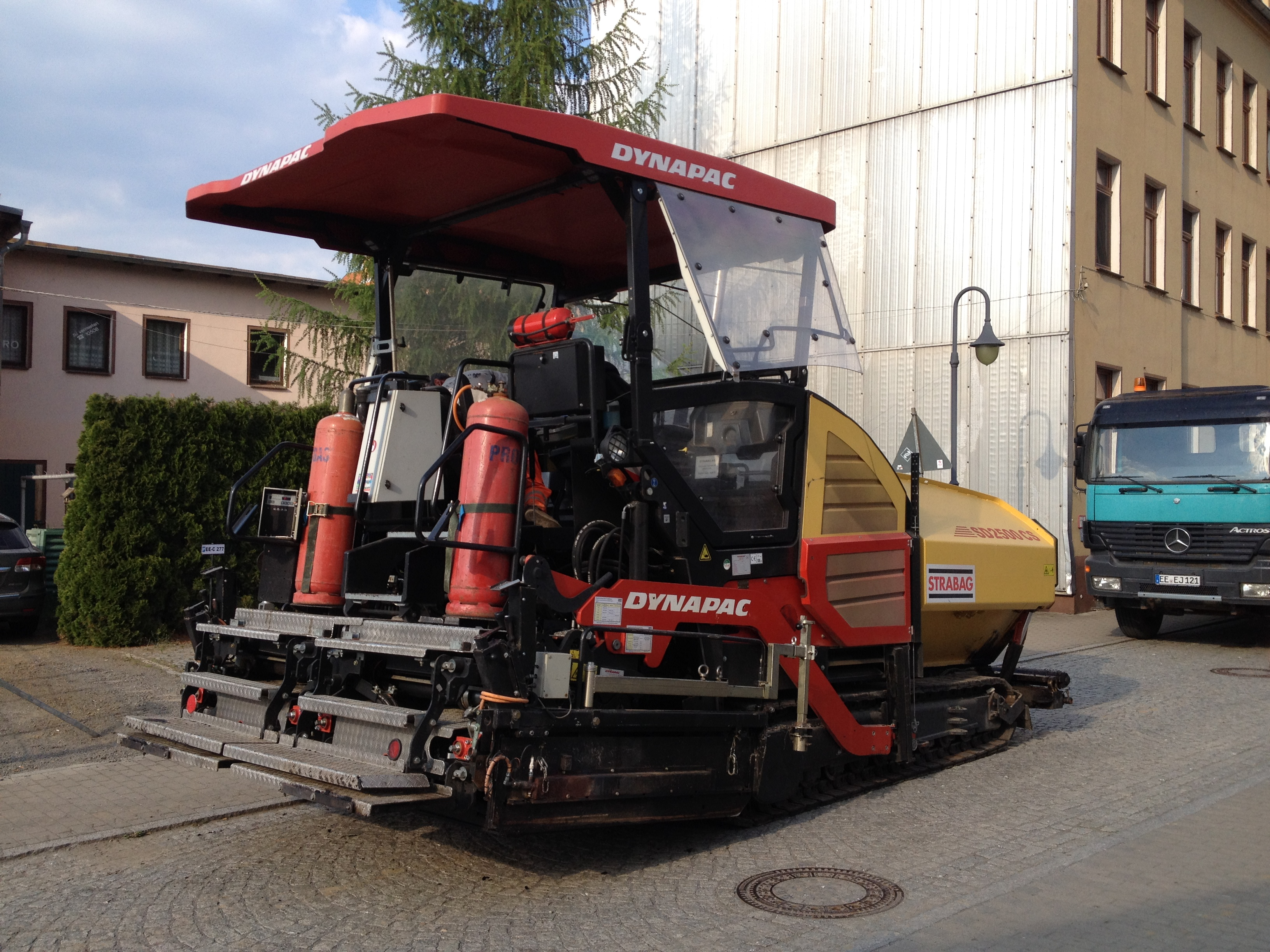 Dynapac SD 2500 CS